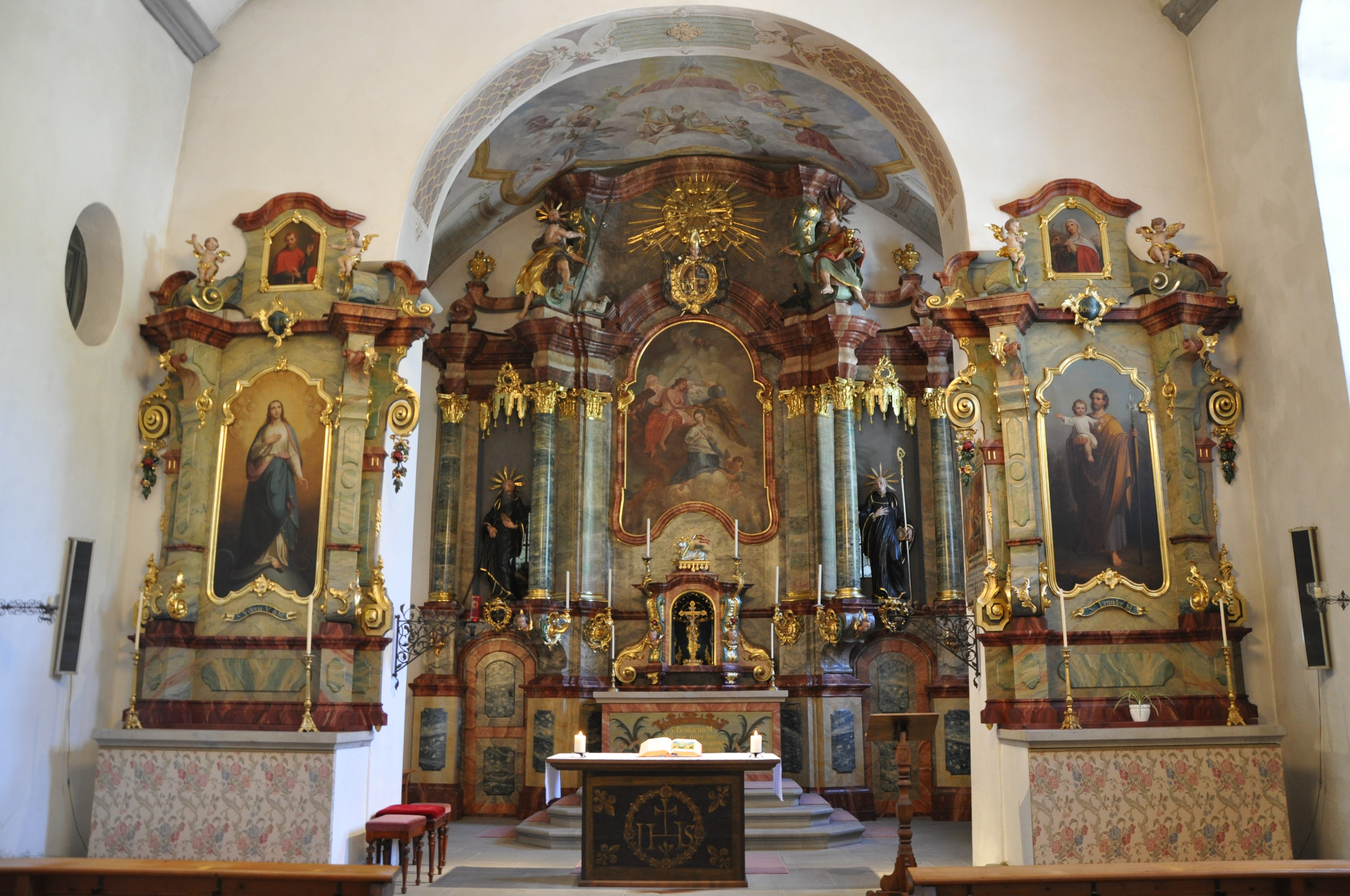 Chorraum Klosterkirche mit Haupt- und Seitenaltären sowie Volksaltar